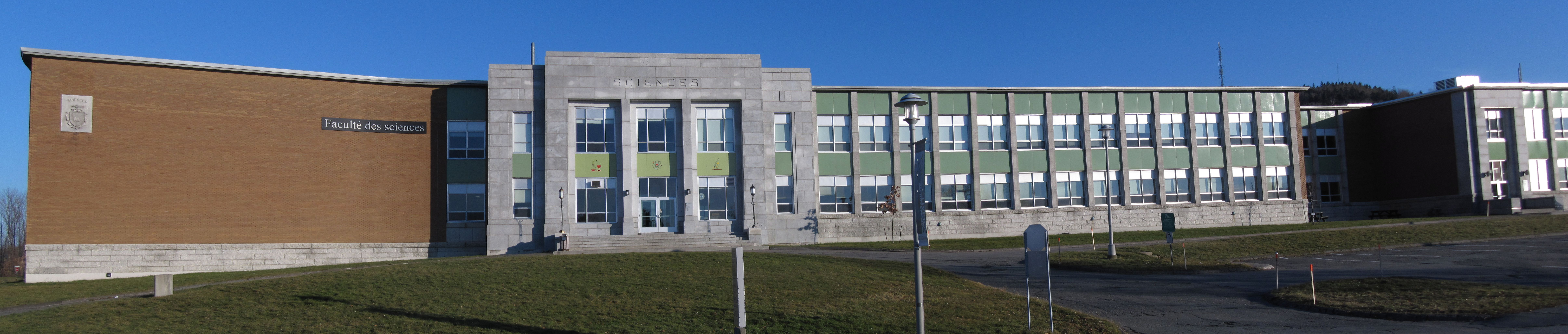 Faculté des sciences de l'Université de Sherbrooke.